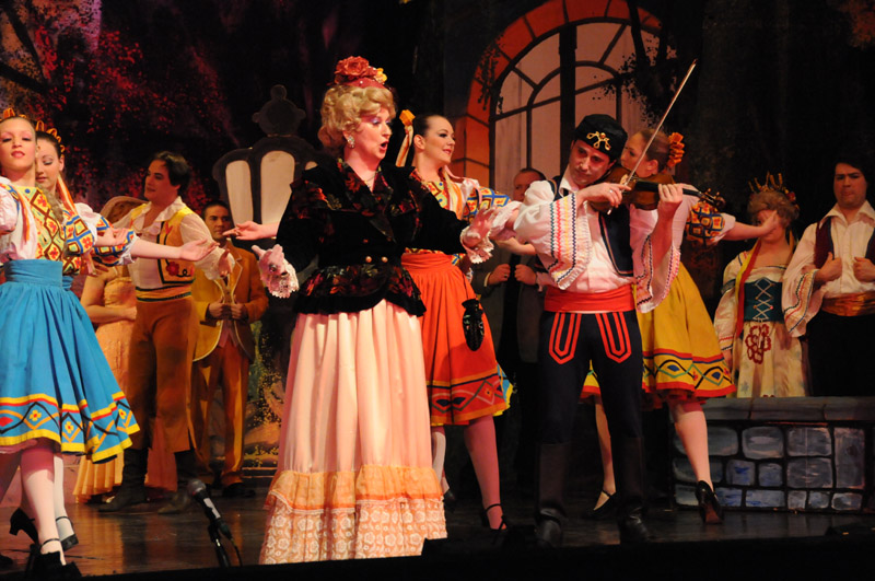 Scène de "Comtesse Maritza" à Ath, par la troupe des Matelots de la Dendre